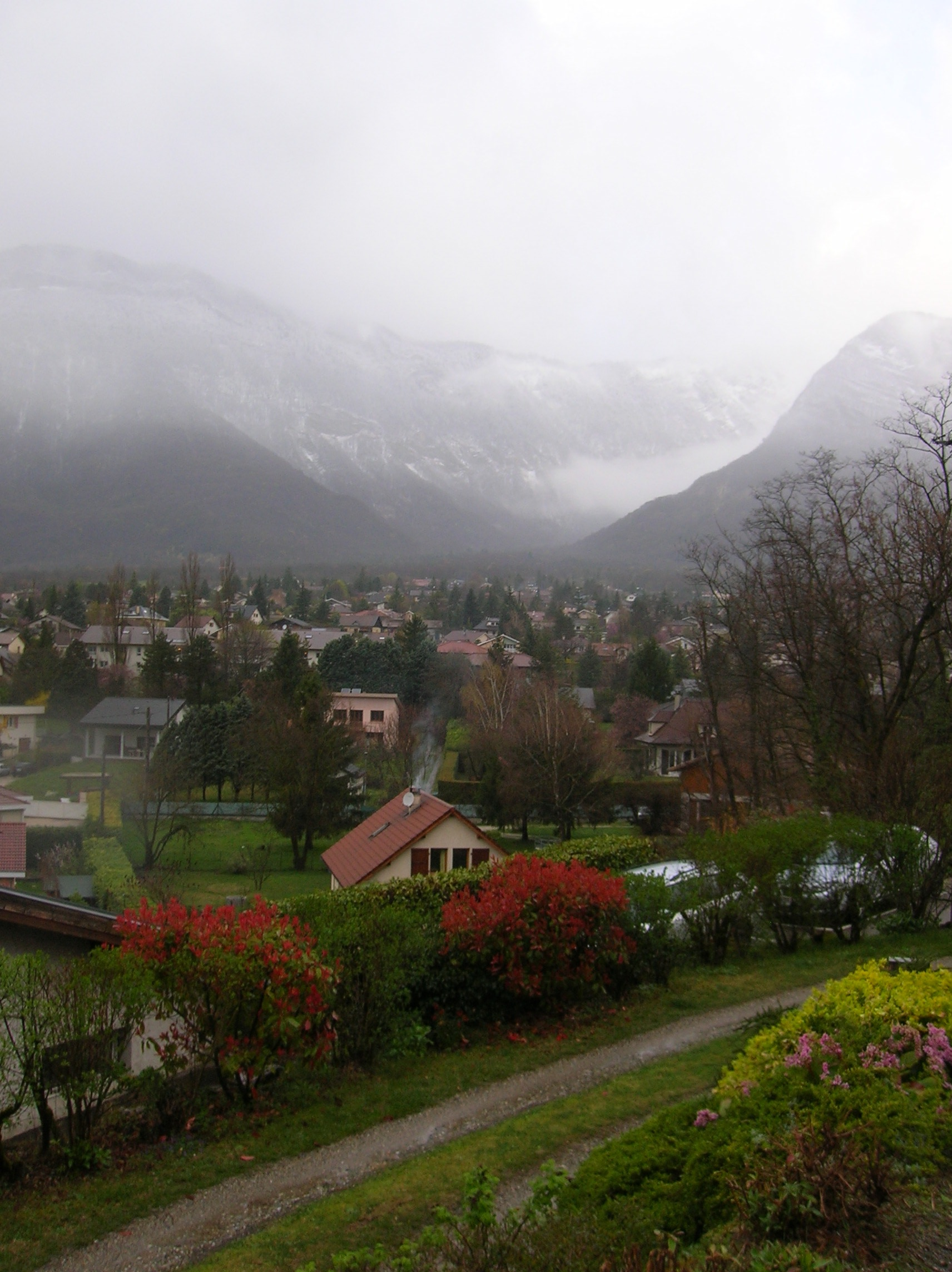 Bernin, Isère, France.